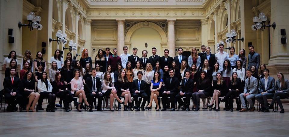 AIESEC a Közgázon Irodájának Csoportképe